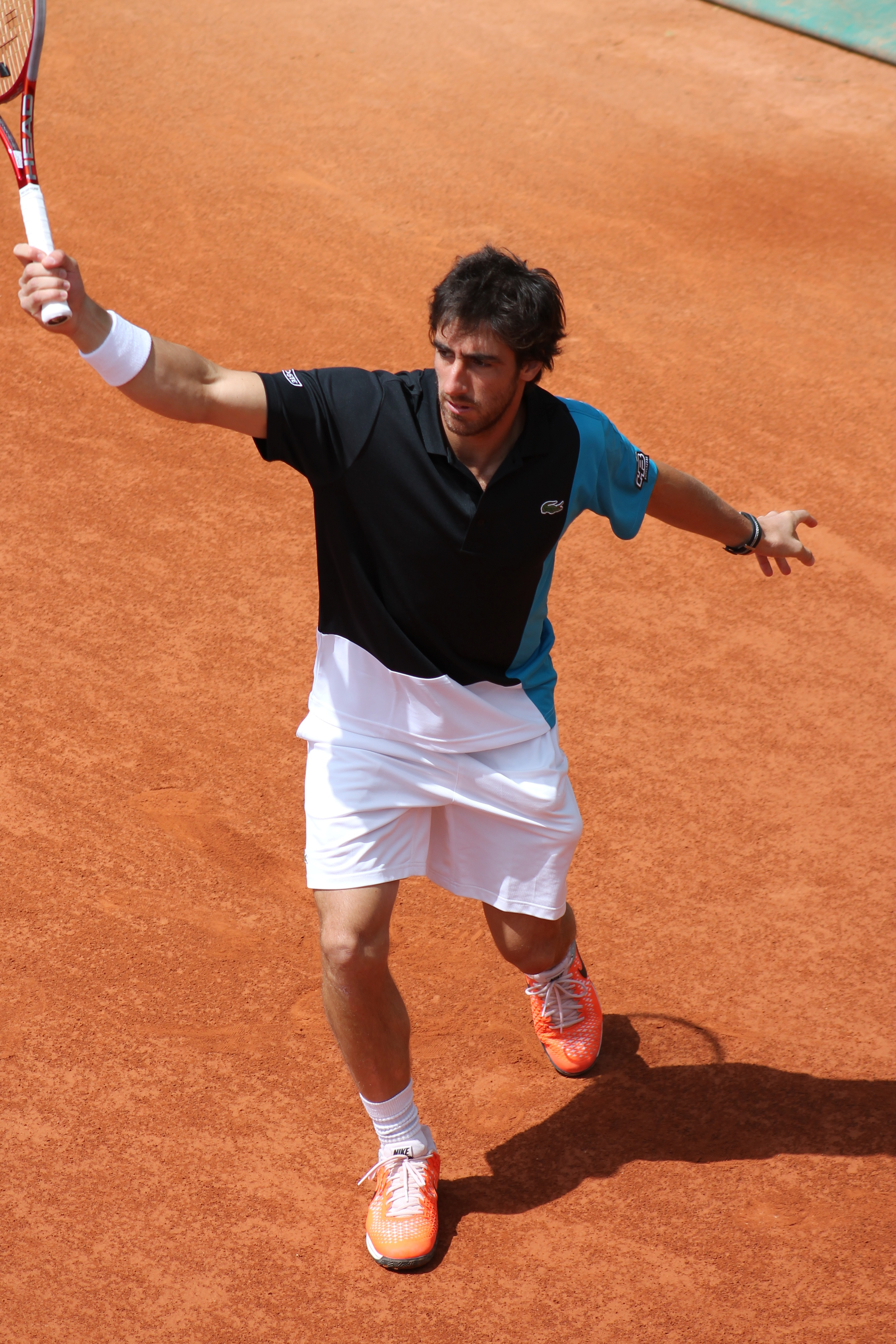 Cuevas RG13 (7)